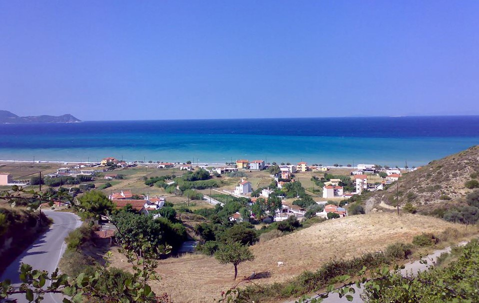 Μουρτερή